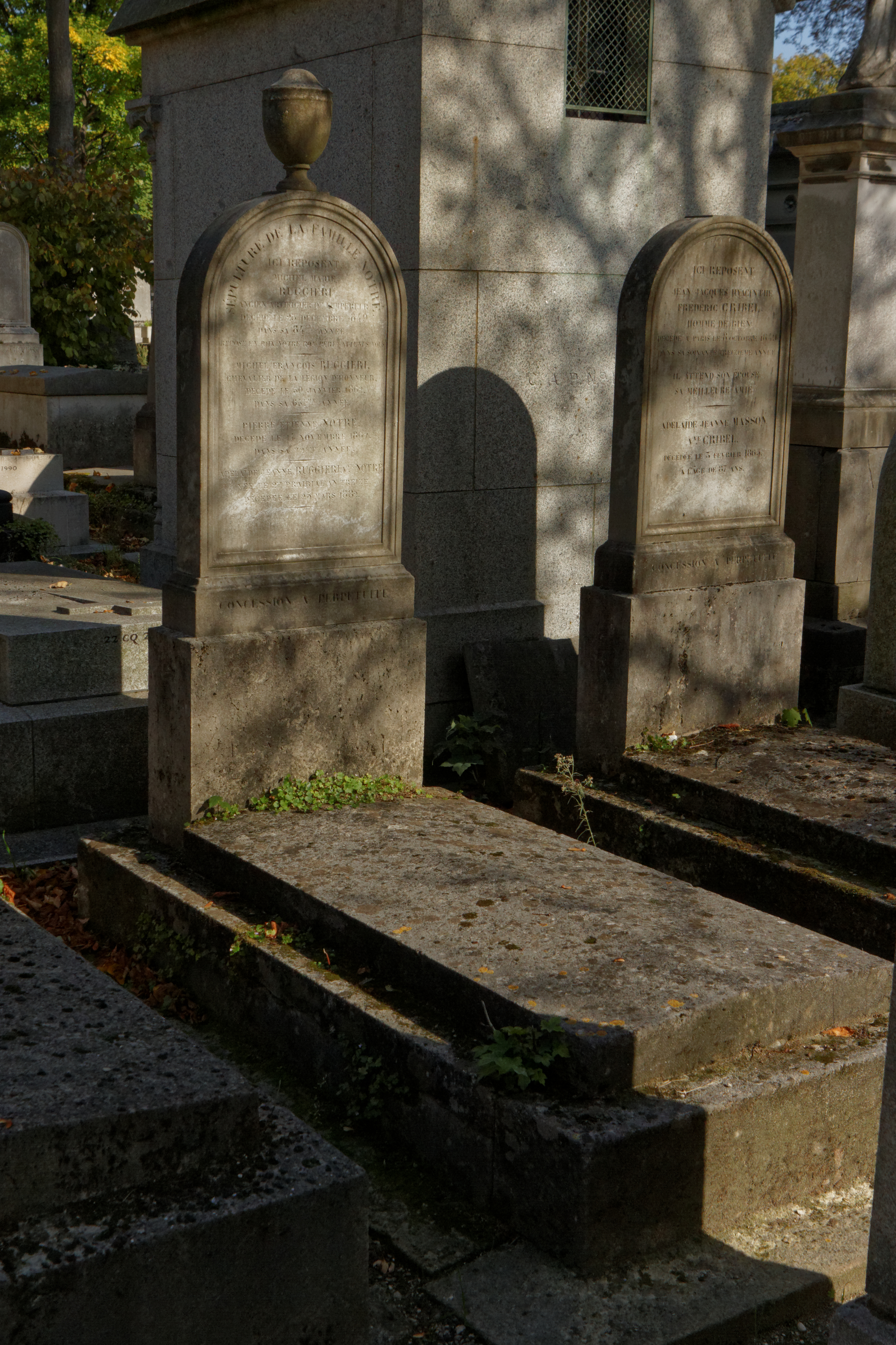 Sépulture de la famille Ruggieri, célèbres artificiers : Michel-Marie Ruggieri (1765-1849), fils de Petronio et artificier de Napoléon Ier et de Louis XVIII ; Michel-François Ruggieri (1796-1862), fils de Michel-Marie et artificier de Méhémet Ali, vice-roi d’Égypte.